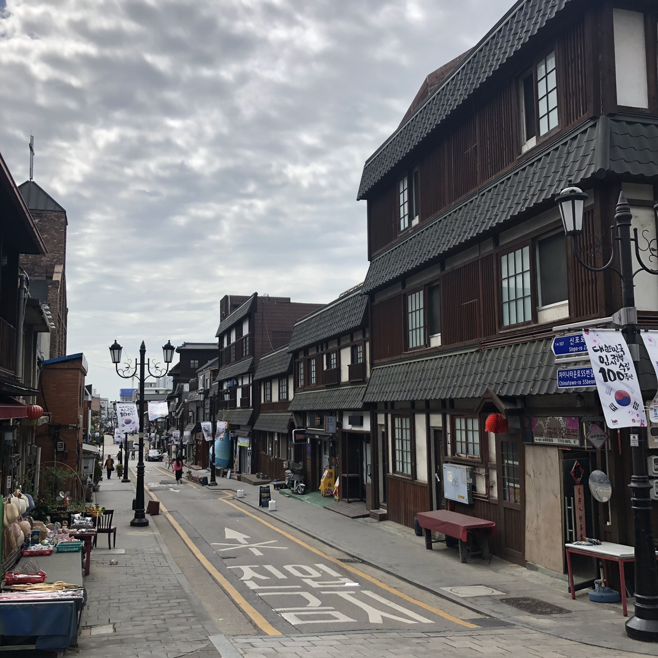 인천 차이나타운에 있는 청일 조계지 경계 계단의 우측에 있는 일본 조계지 거리